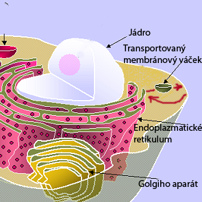 Ilustrace vezikulárního transportu v typické živočišné buňce.